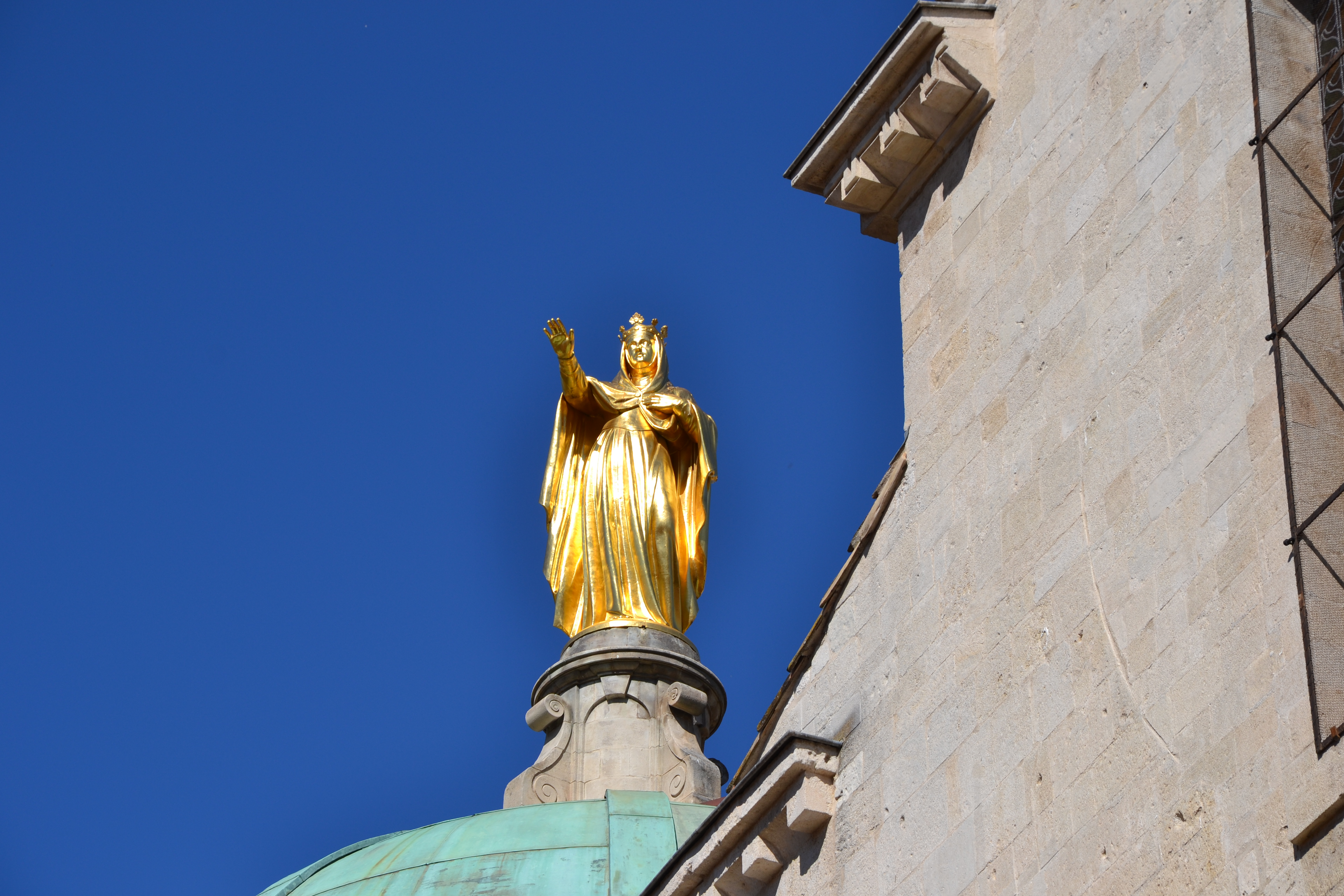 Cathédrale Sainte-Anne d'Apt (Classé) .